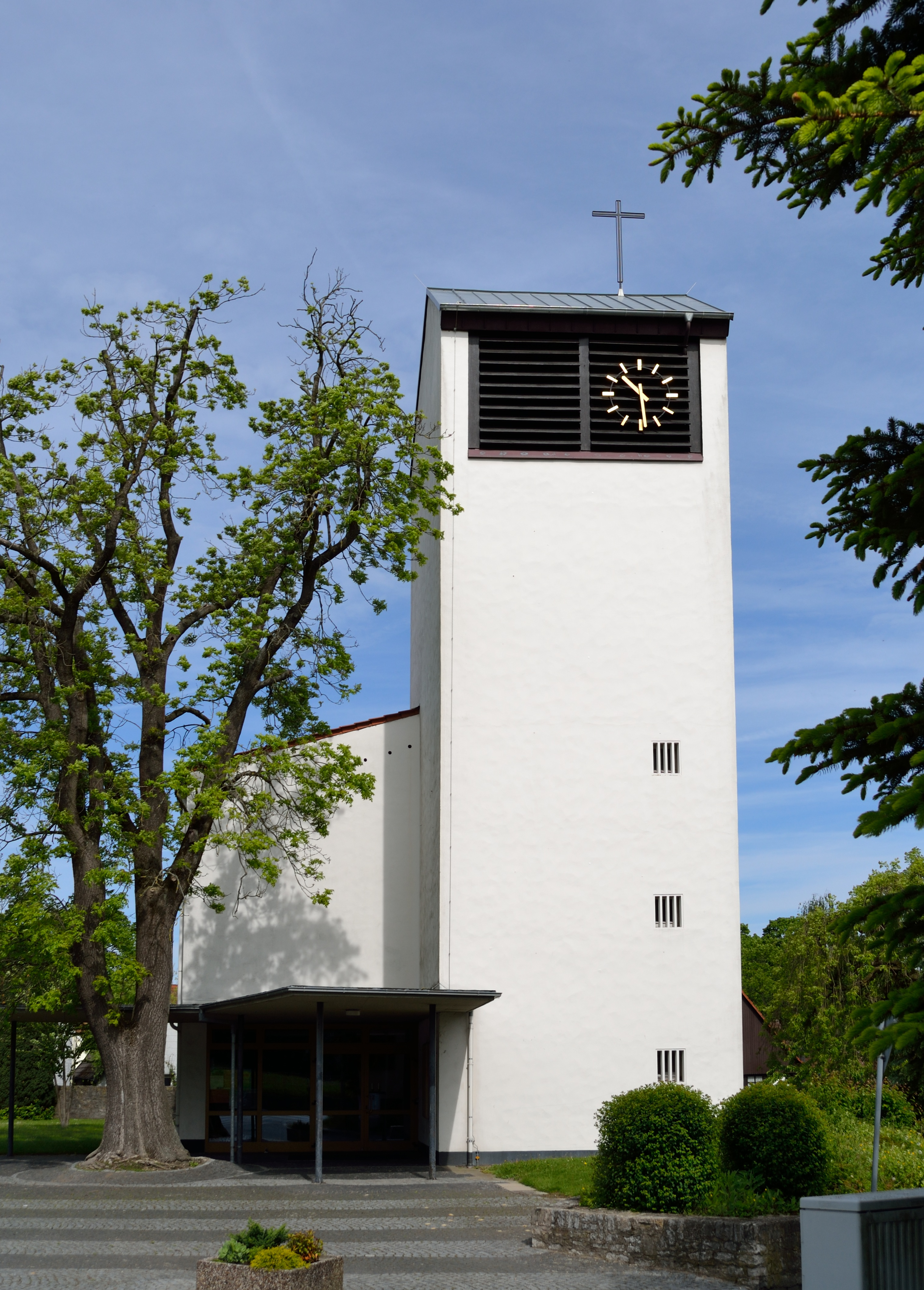 Evangelisch-reformierte Kirche in Detmold/Heidenoldendorf